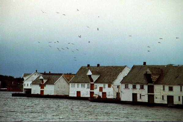 Gamle sjøbuer